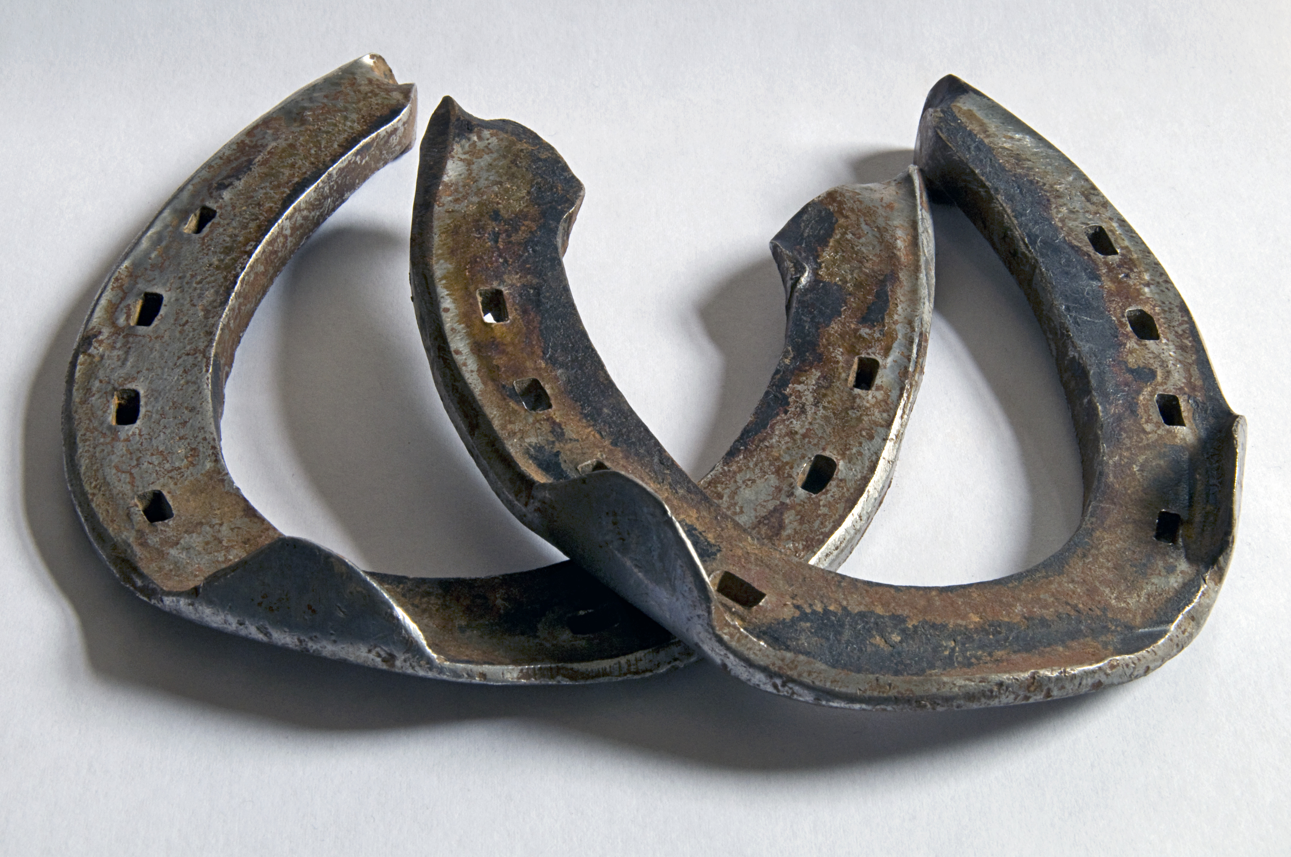 Hufeisen mit Zehen- und Seitenkappen (Aufzügen) Das Eisen mit der Zehenkappe ist ein Vordereisen aus dem Jahr 1984, das Eisen mit den Seitenkappen ist ein Hintereisen aus dem Jahr 1981